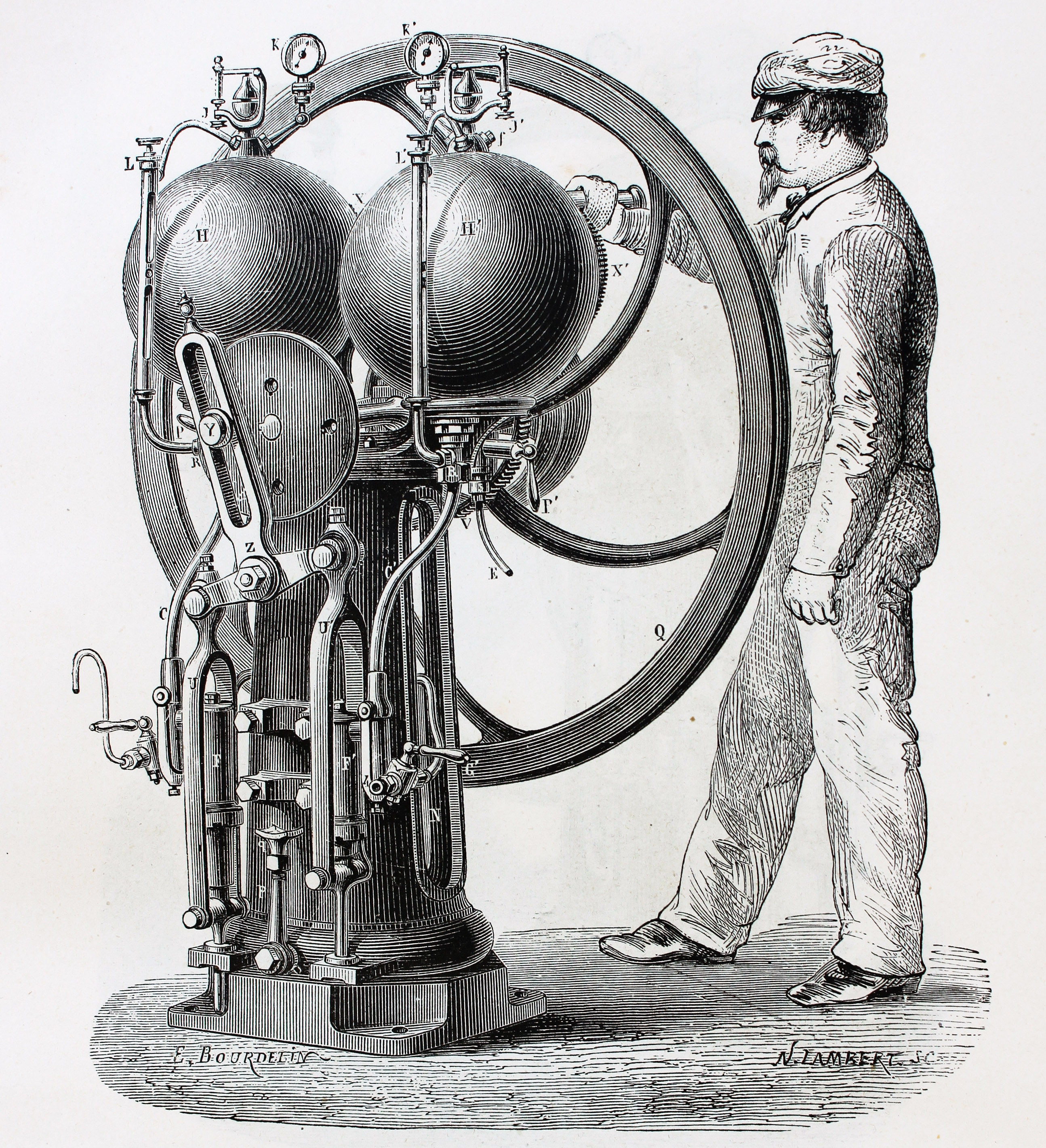 Ilustraciones de la obra : Les merveilles de l'industrie ou, Description des principales industries modernes / par Louis Figuier. - Paris : Furne, Jouvet, [1873-1877]. - Tome III